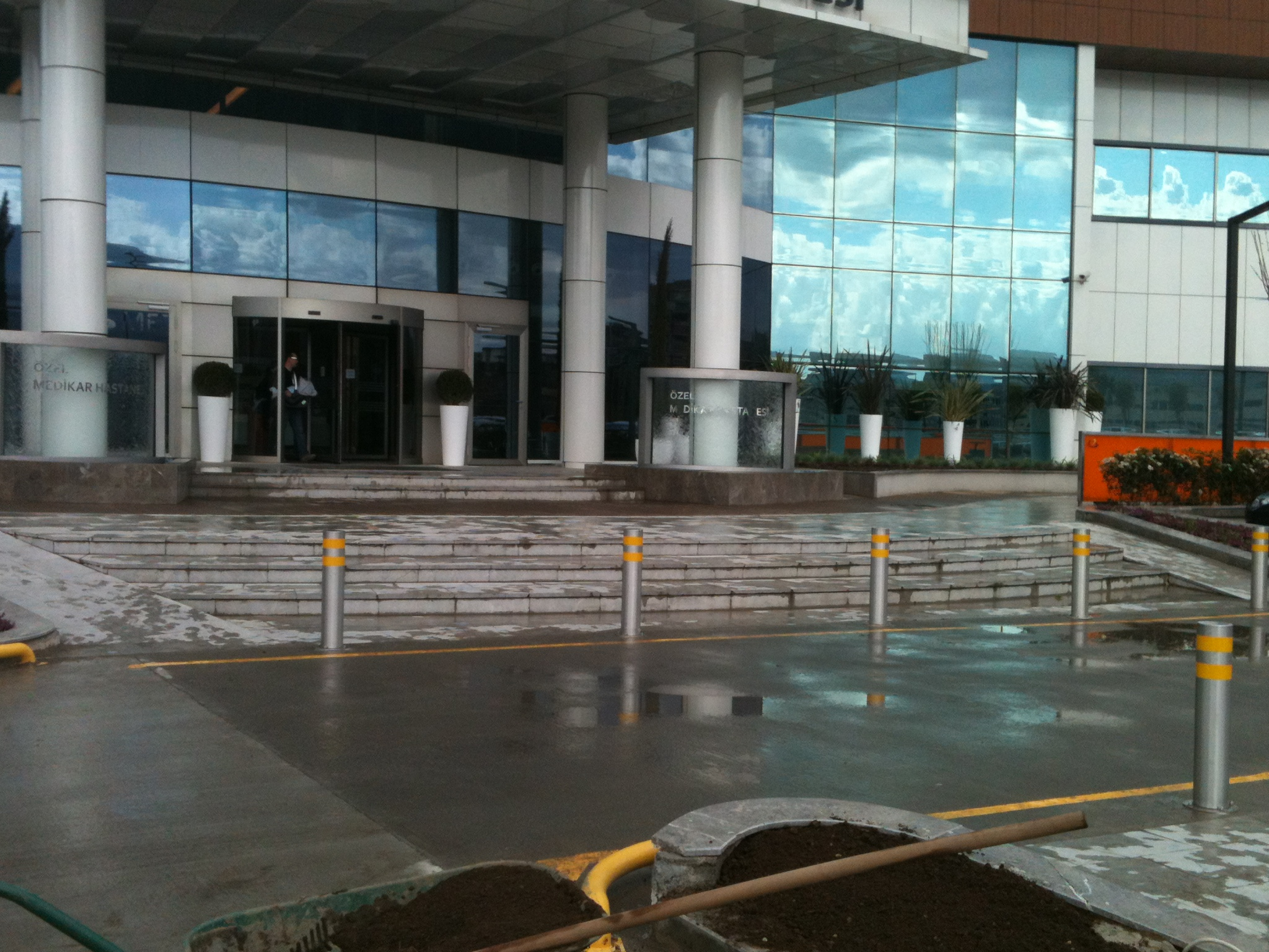 peyzaj proje,planlama ,tasarım ile mekanlarda kullanacağınız aksesuar ve kentsel donatılar kullanılarak fonksiyonel ve yaşanabilir dış mekanlar yaratmaktır